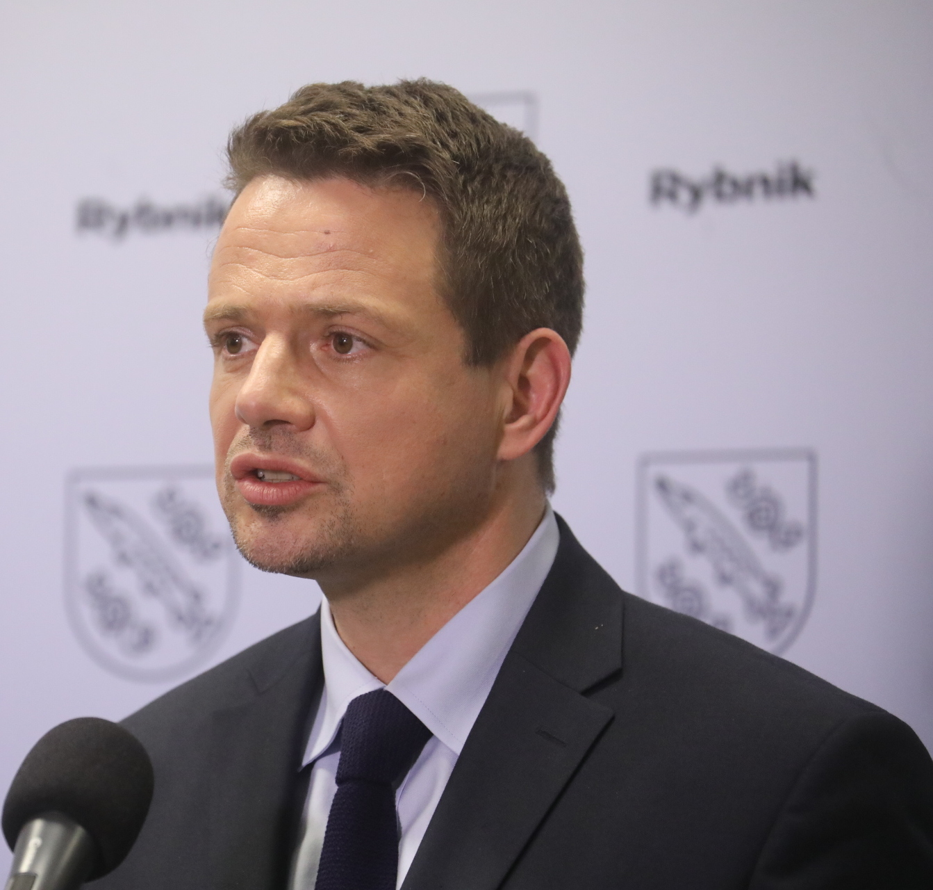 Rafał Trzaskowski w Rybniku